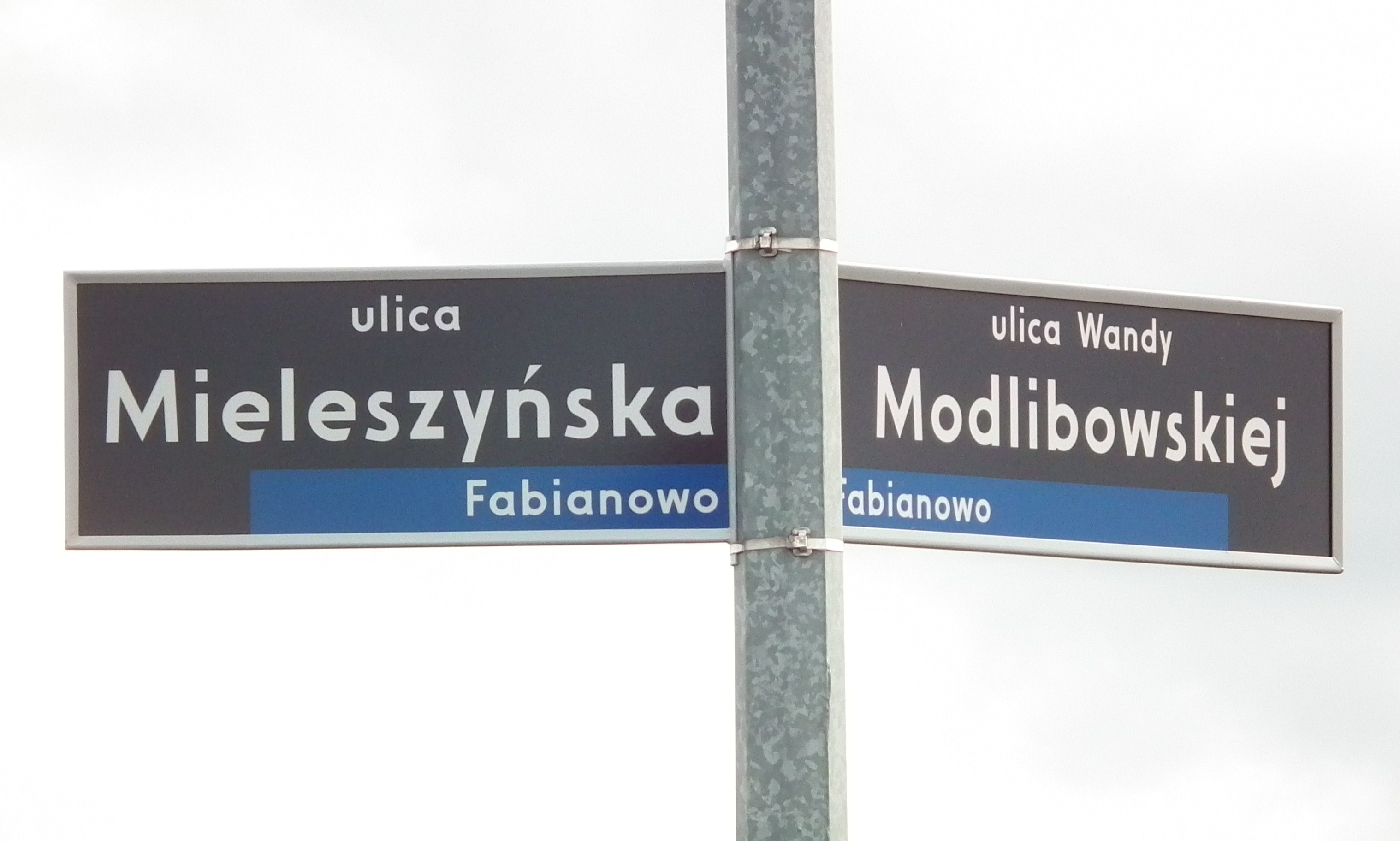 Tablica uliczna na Fabianowie w Poznaniu.